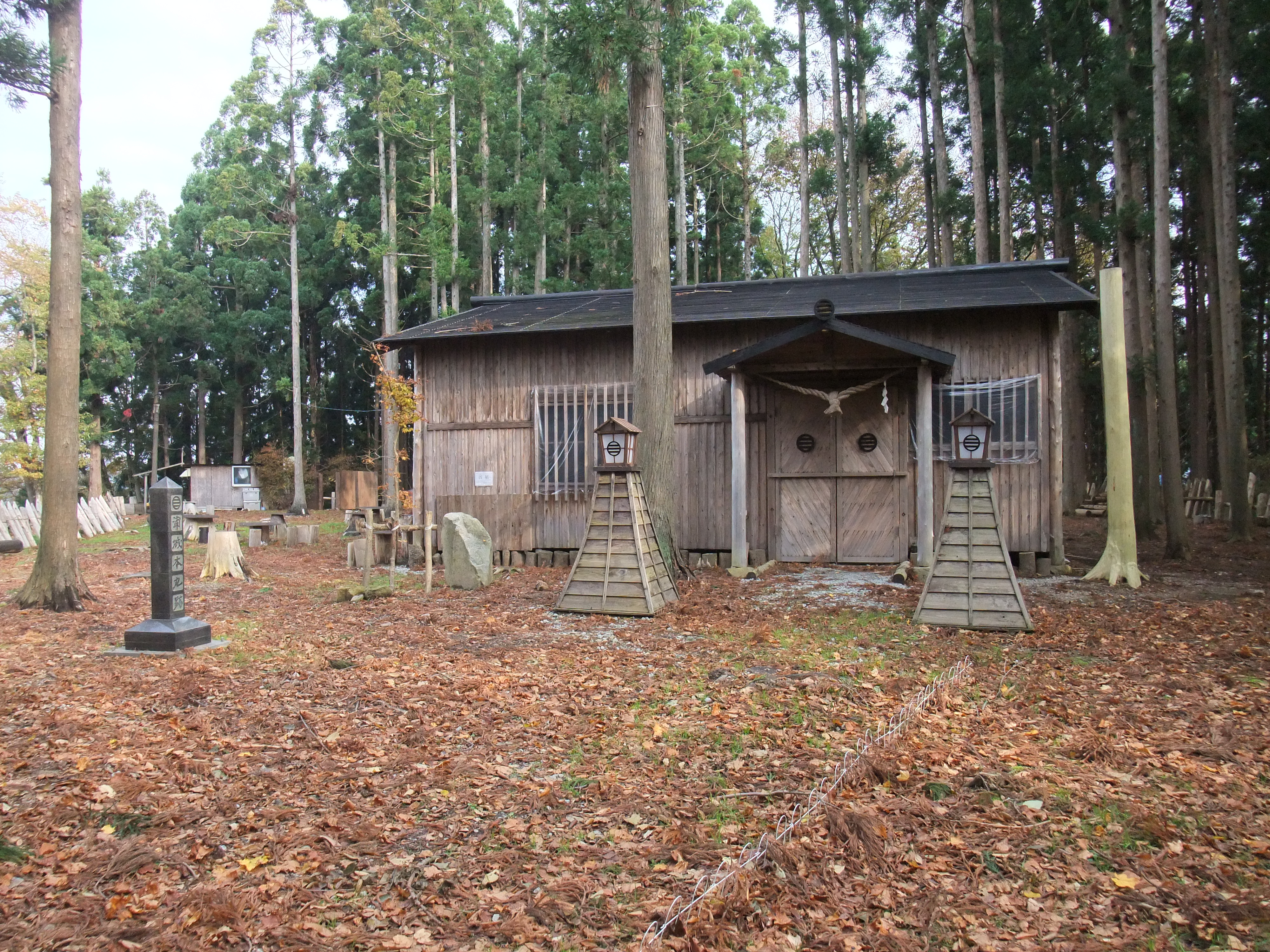 浦城本丸跡